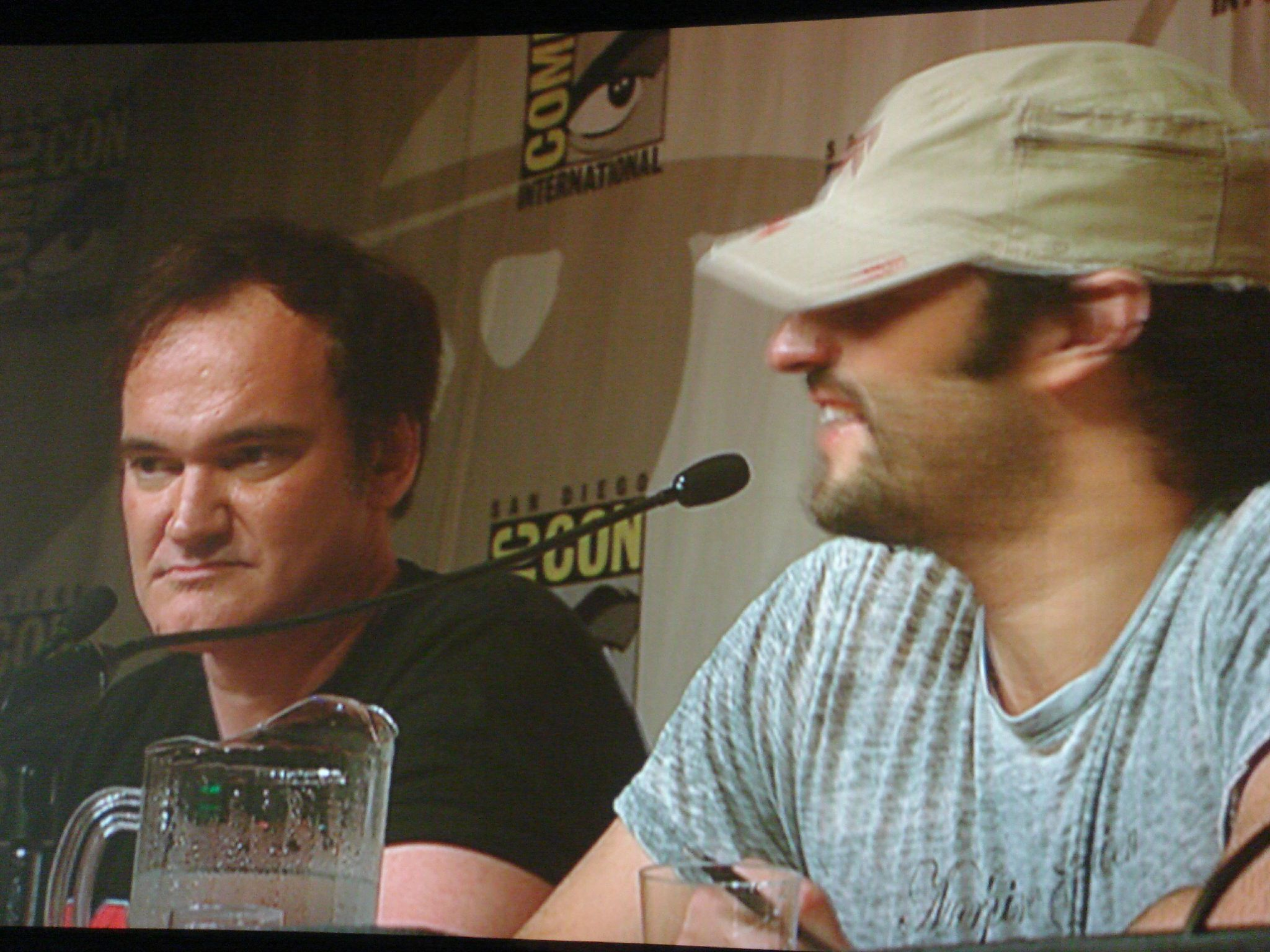 Quentin Tarantino e Robert Rodriguez a San Diego al Comic-Con International 2006 parlano di Grindhouse. Autore: Kevin Tostado Fonti